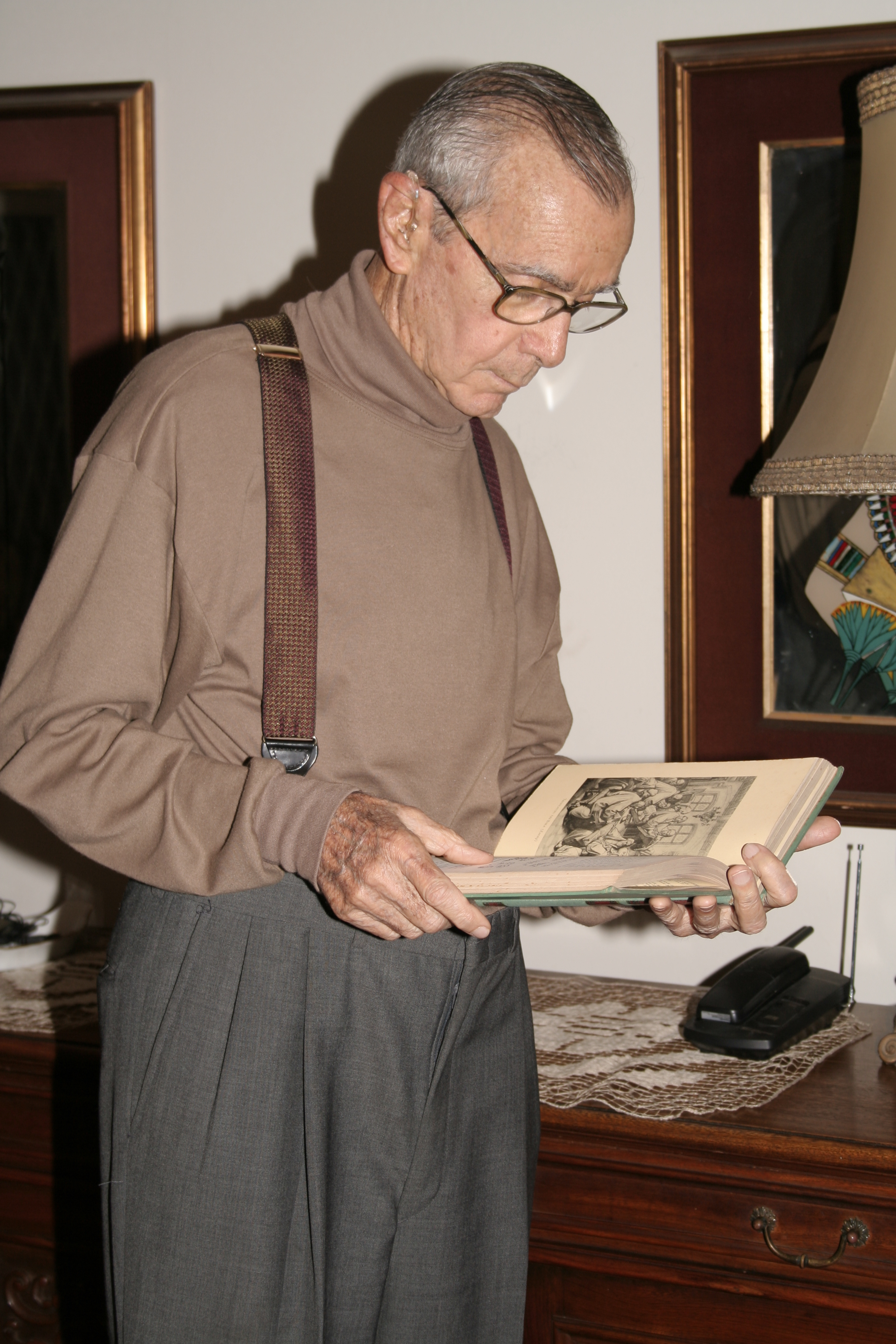 Foto do escritor Herminio C. Miranda